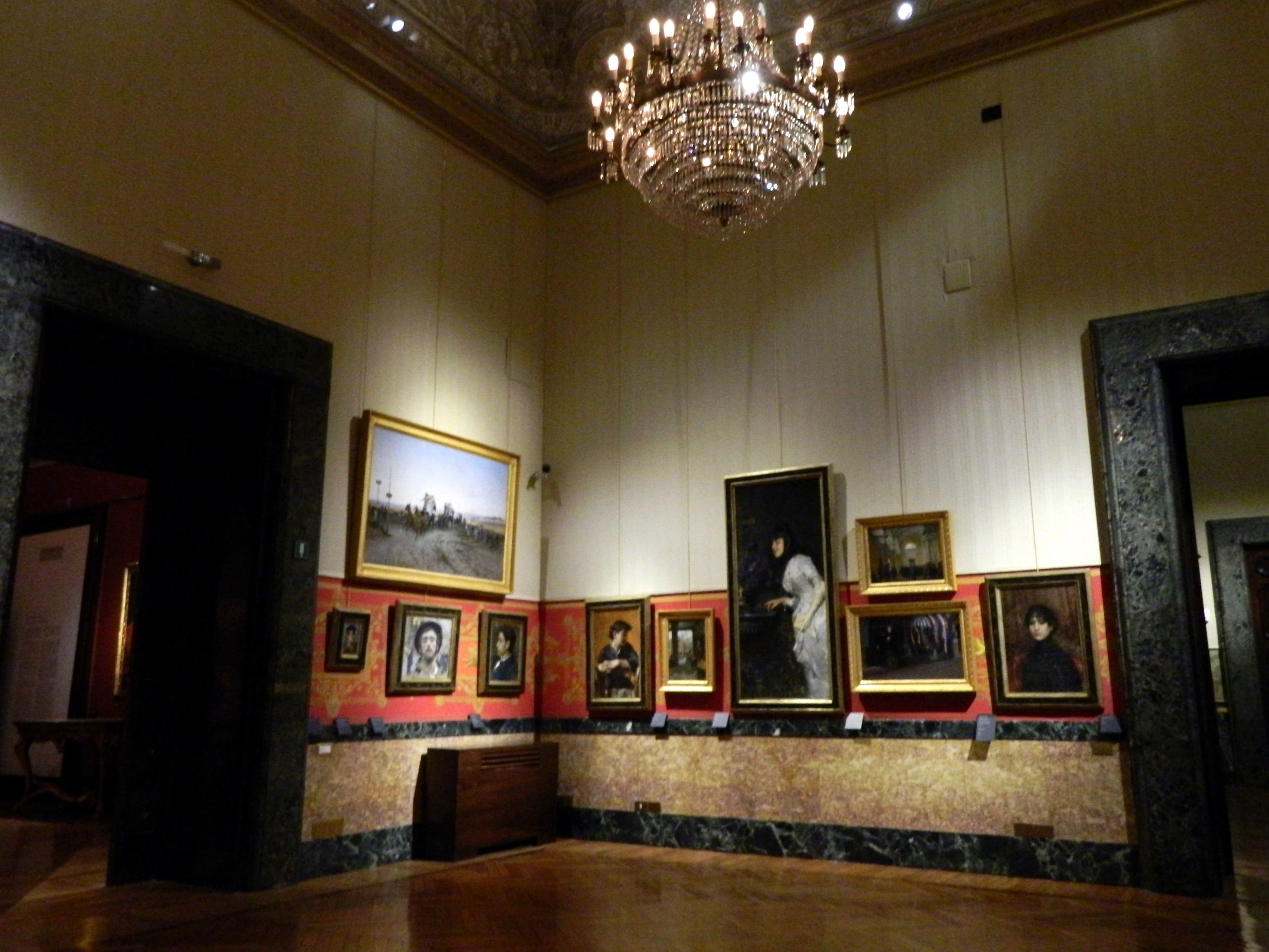 Sala dell'Ottocento - Palazzo Zevallos (Napoli)